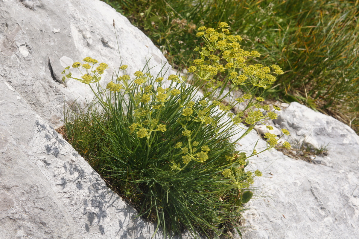 Skalna prerast na Jezerskem Stogu.